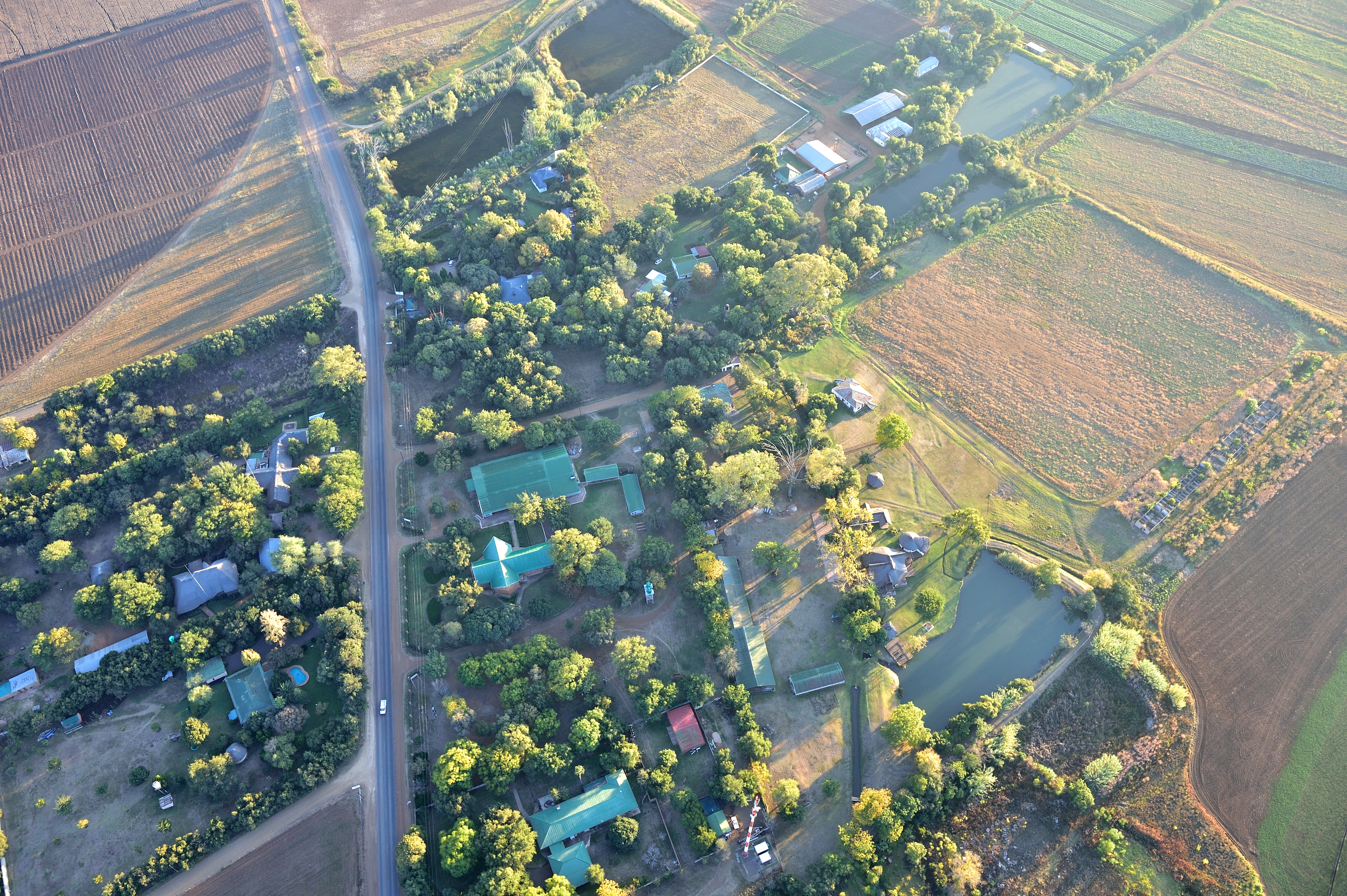 'n Deel van Skeerpoort uit 'n warmlugballon gesien.